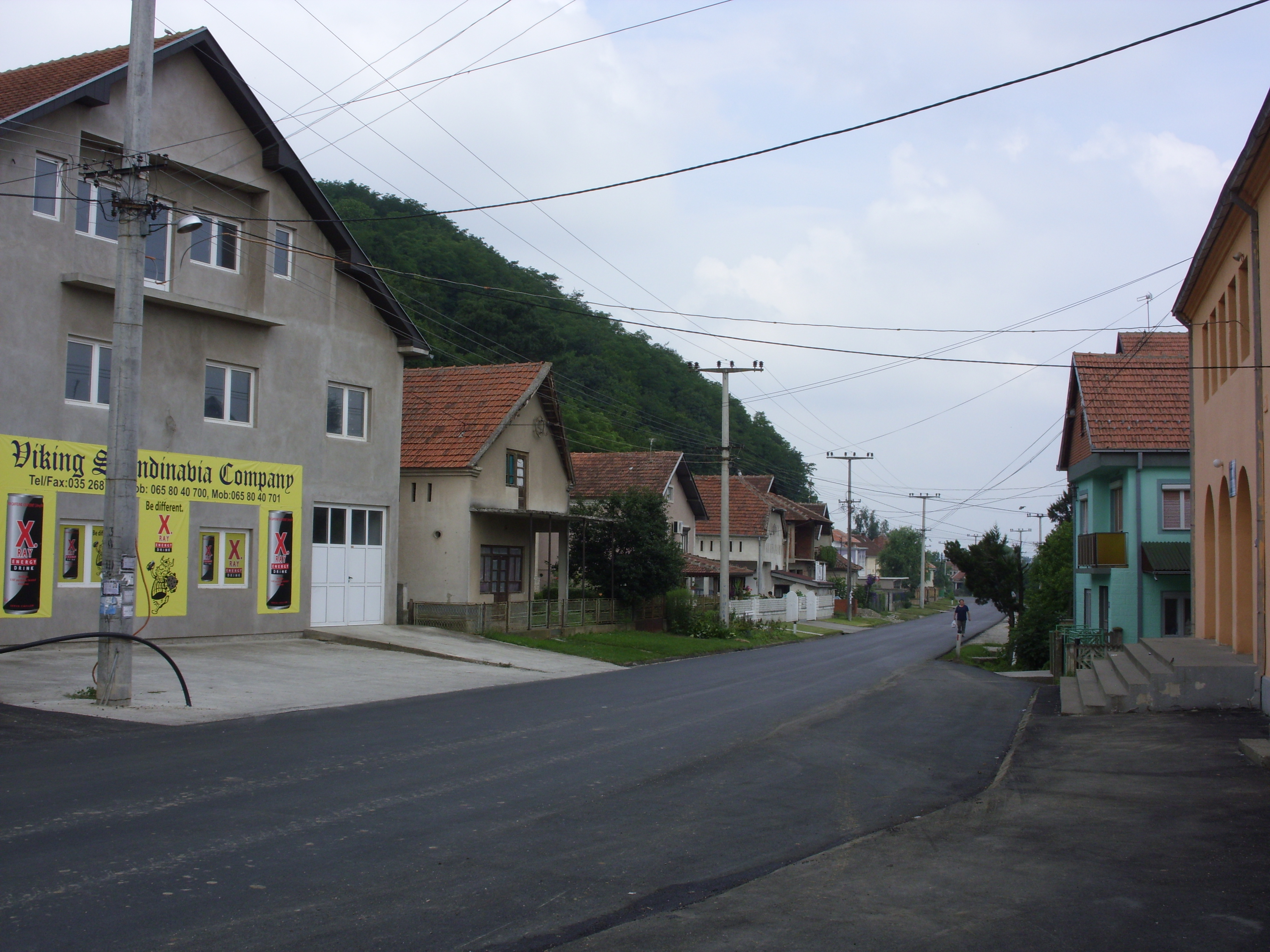 village Milosevo, Serbie